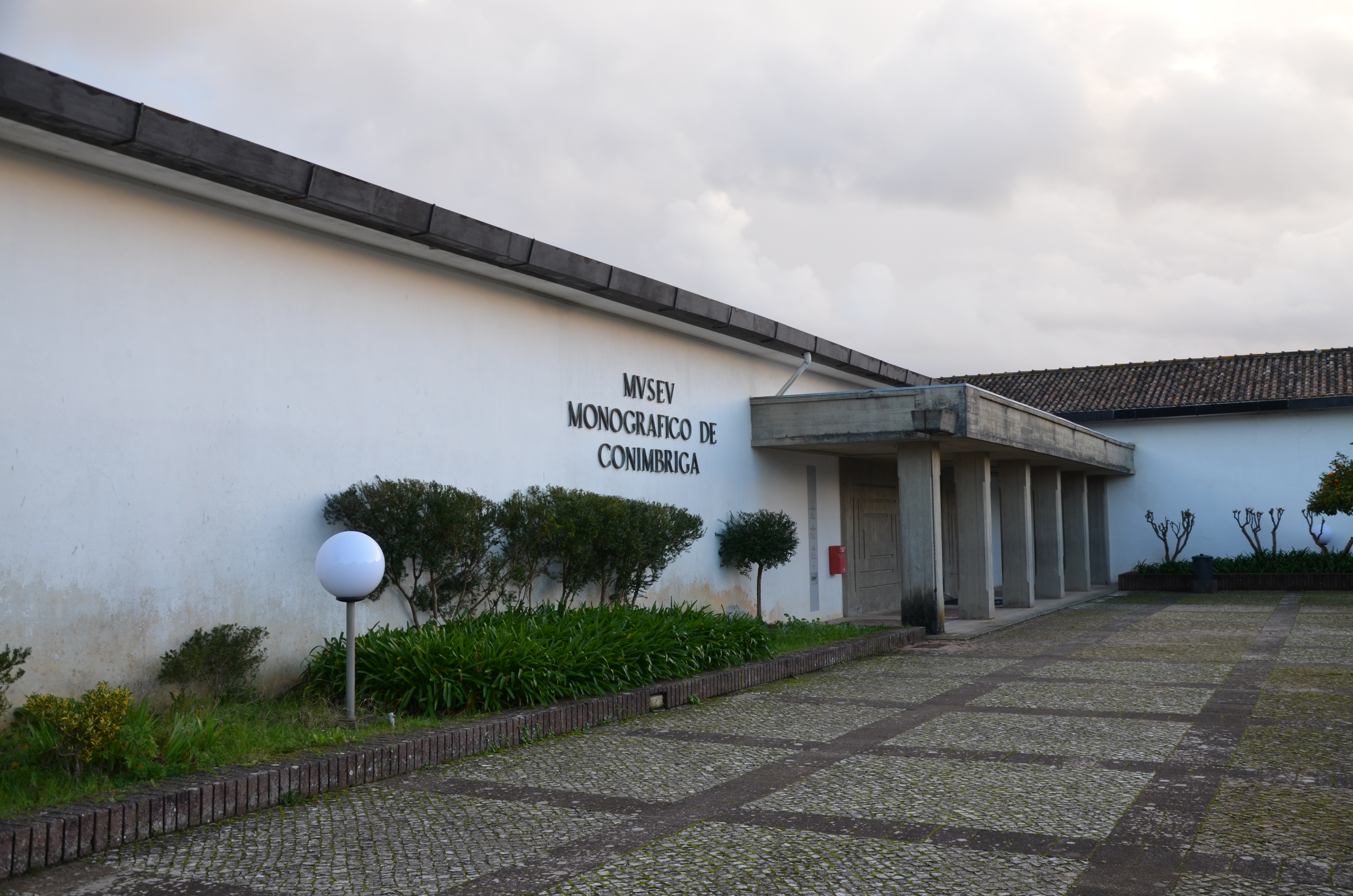 Conimbriga